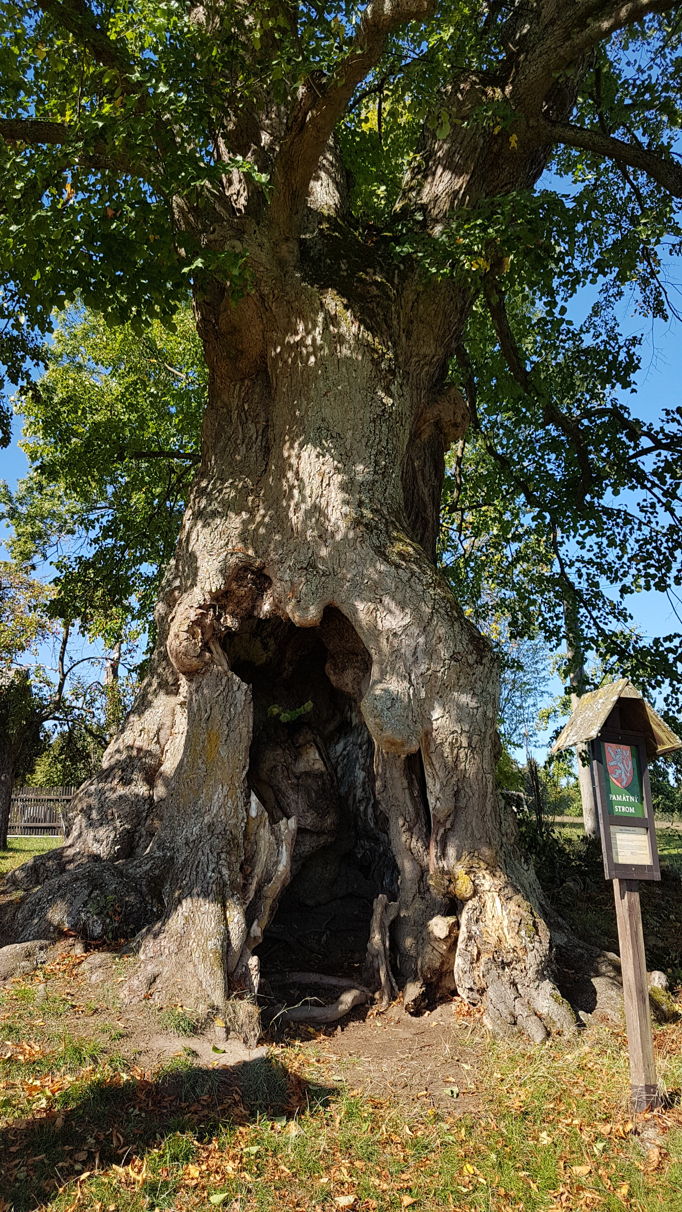 Dvorská lípa, obec Kuklík, osada Chobotský Dvůr